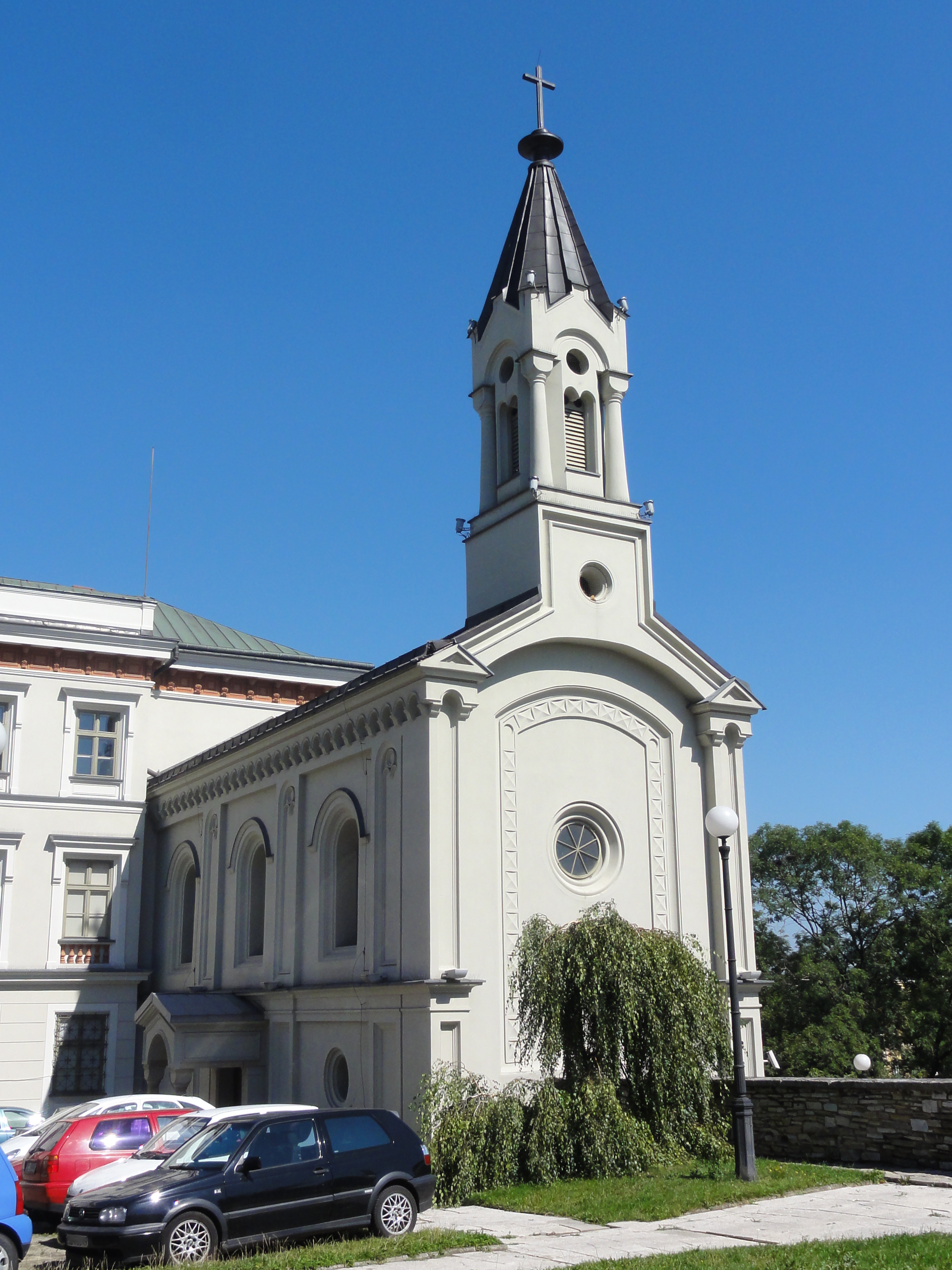 Kaplica zamkowa św. Anny w Bielsku-Białej